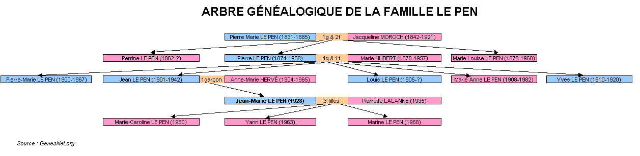 Ébauche de l'arbre généalogique de la famille LE PEN